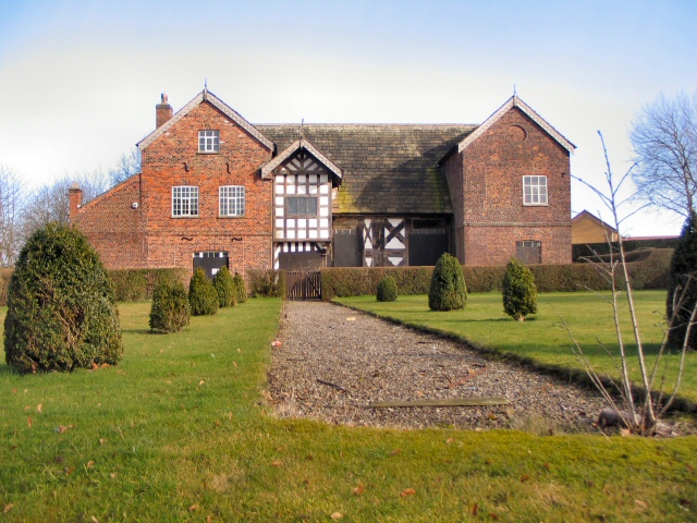 Baguley Hall